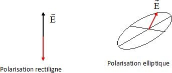 types de polarisations